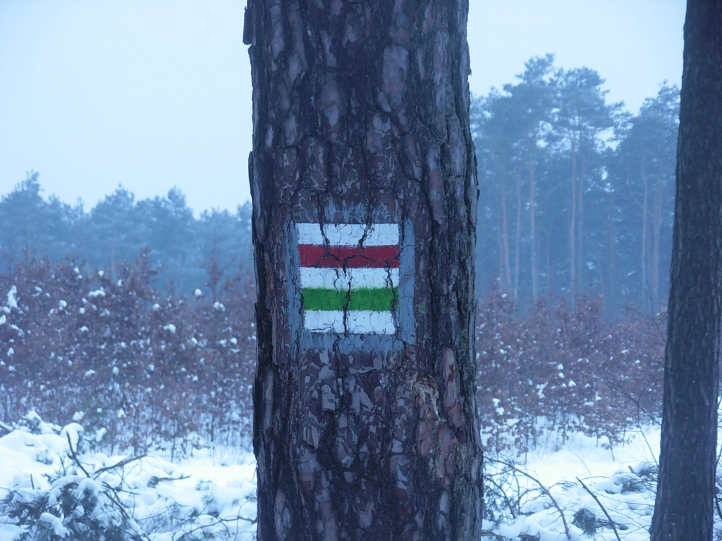 Znak szlaków turystycznych pieszych w Pusczzy Bydgoskiej